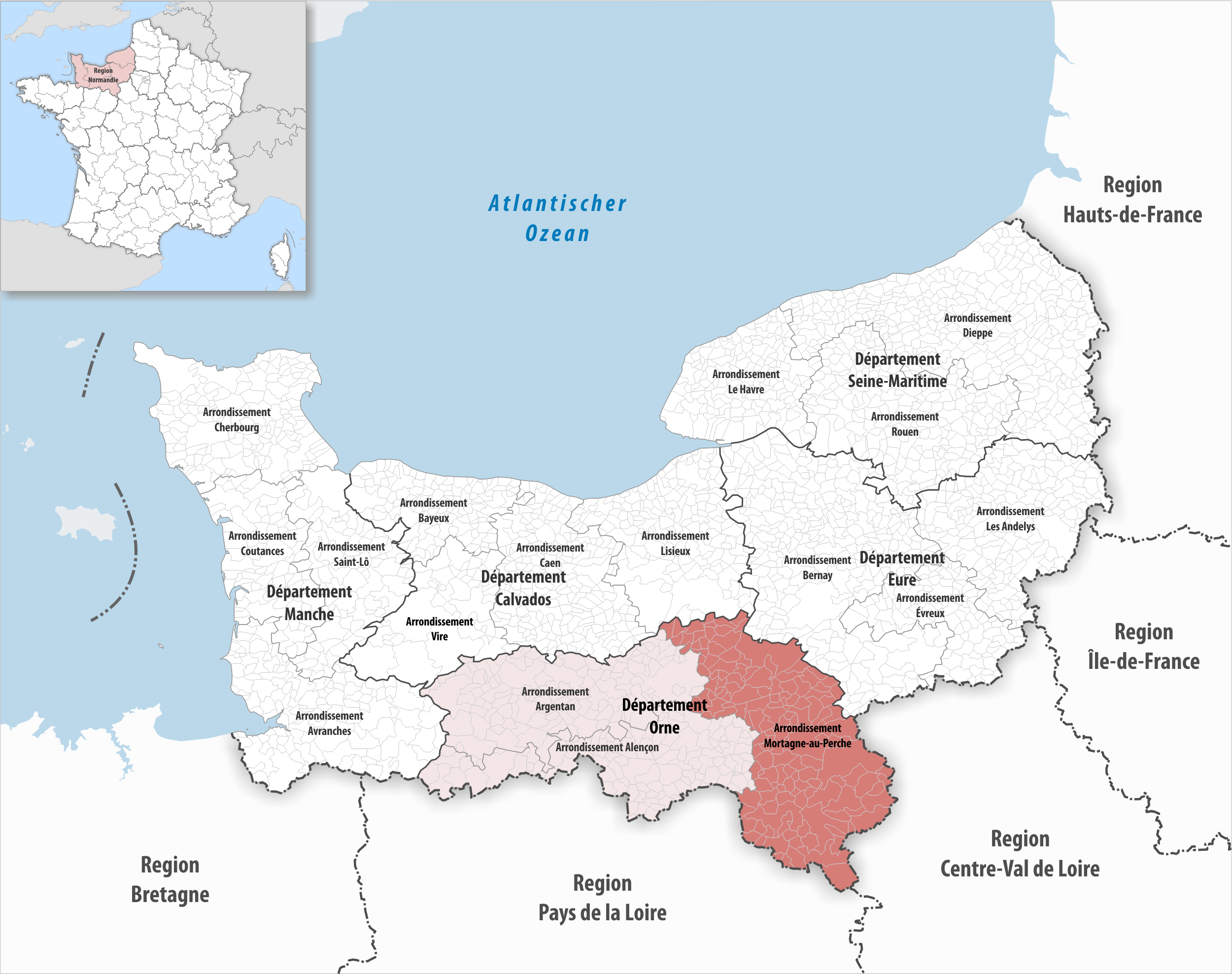 Lage des Arrondissements Mortagne-au-Perche